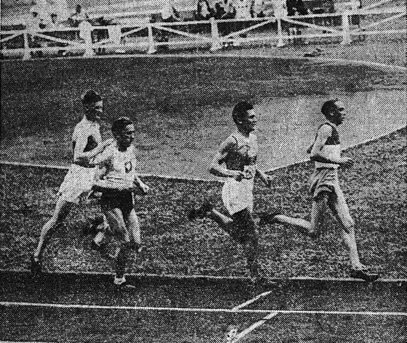 Le 5000 mètres victorieux du français Roger Rochard aux championnats d'Europe de Turin en 1934.